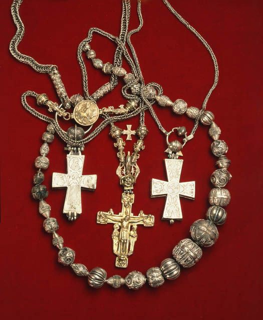 Halikon aarre